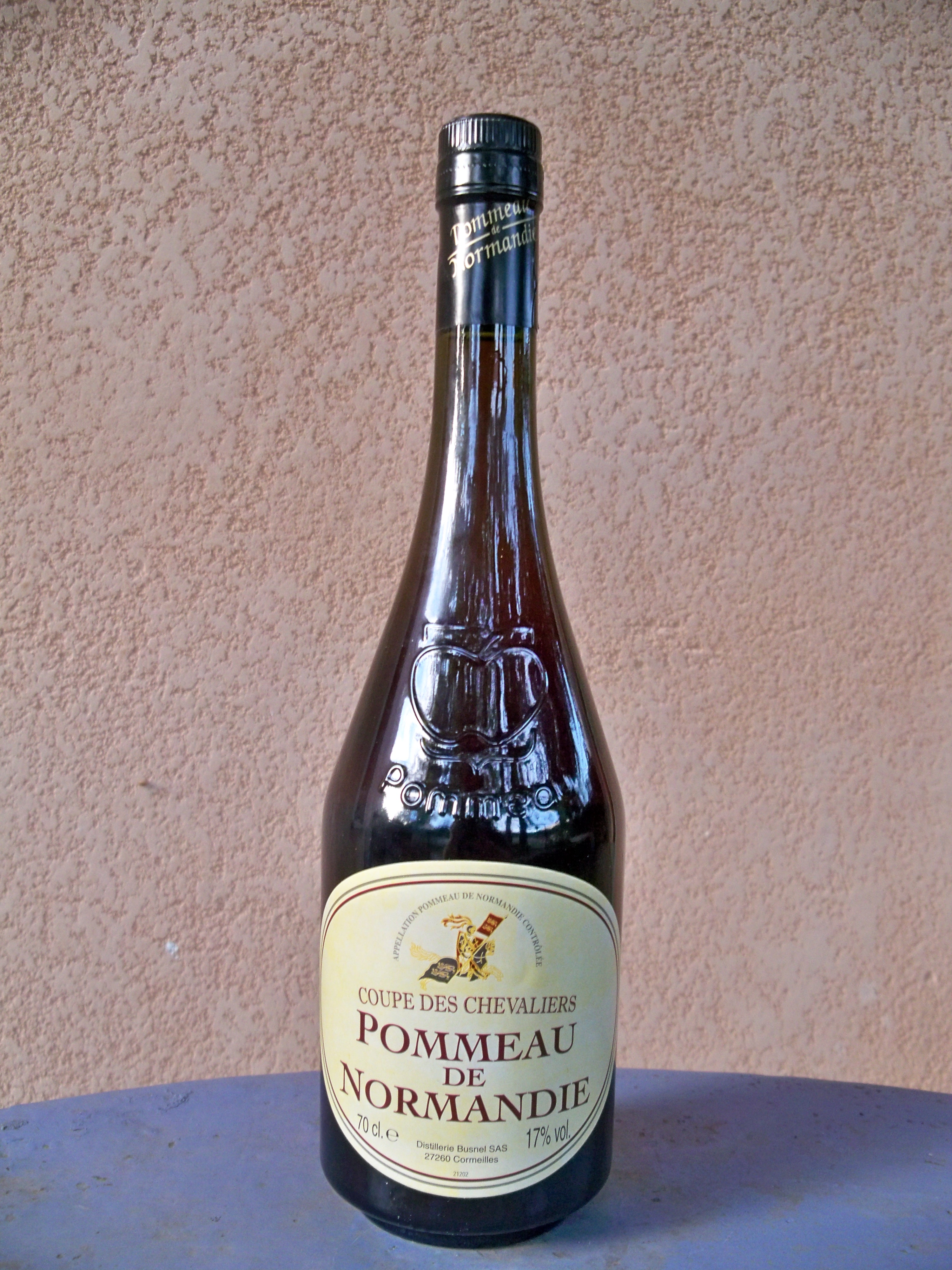 bouteille de Pommeau de Normandie